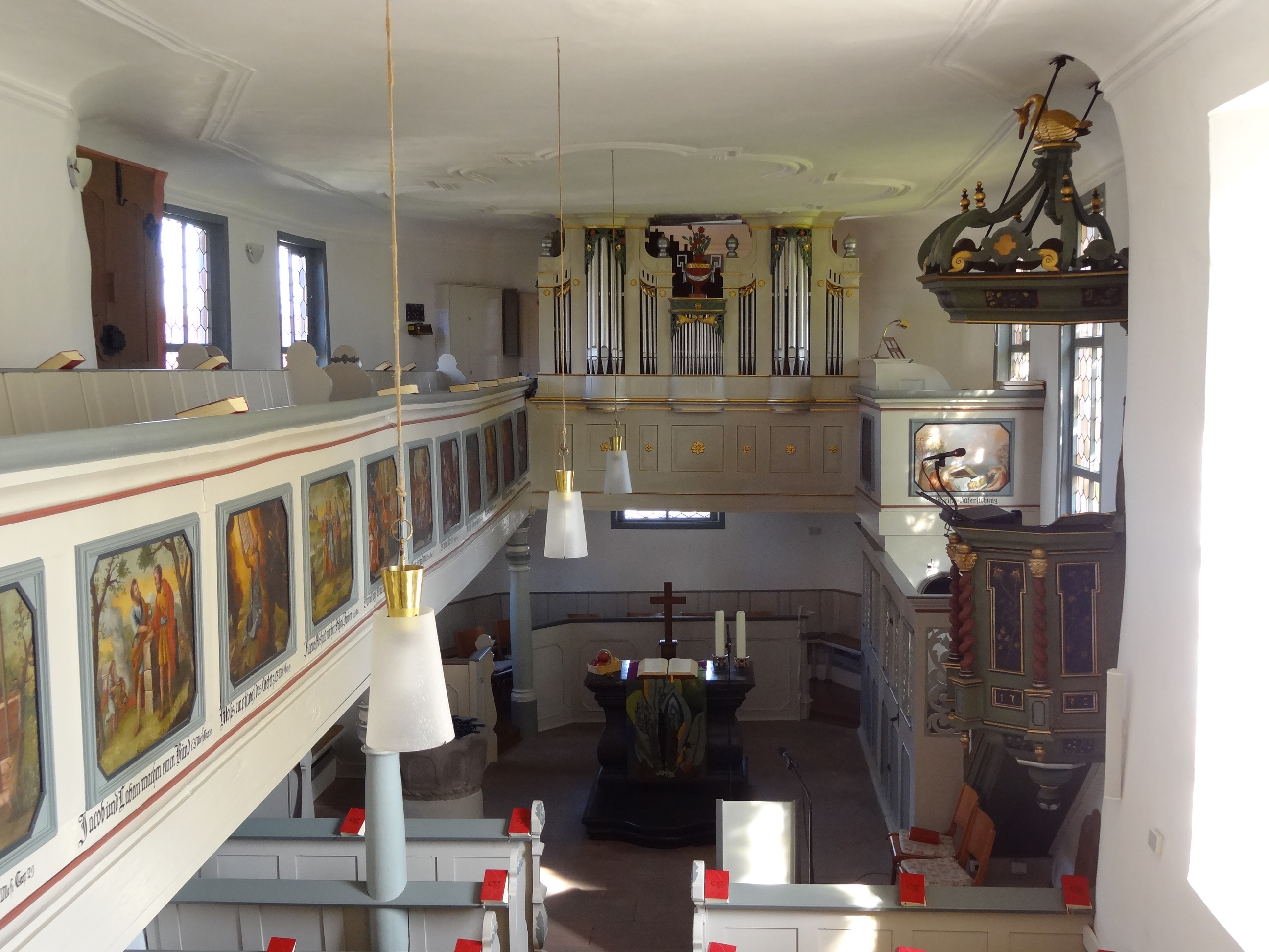 Evangelische Pfarrkirche Ebersgöns